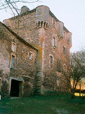 Chateau de Balguier (12) dans l'Aveyron